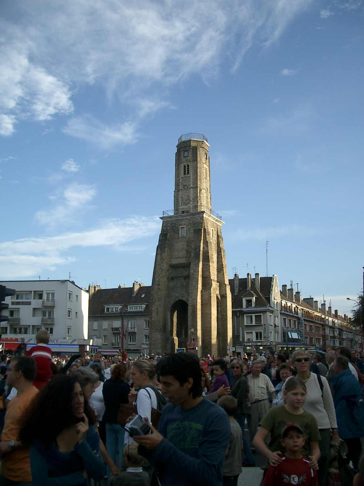 La Tour du Guet (hauteur 38 mètres), à Calais (France). La foule, stationnée sur la Place d'Armes, attent la parade de la troupe Royal de Luxe (l'Eléphant du Sultan et la Petite Géante, en automne 2006).On remarque : 2 niveaux bien distincts à cet édifice, sa section carrée, ses puissants contreforts sur la partie inférieure, une haute ouverture à son centre, à la base (une porte) (A la date de l'import depuis Flickr par Marc ROUSSEL, l'auteur n'avait ni légendé ni commenté sa photo.).Royal de Luxe Calais - 070.jpg